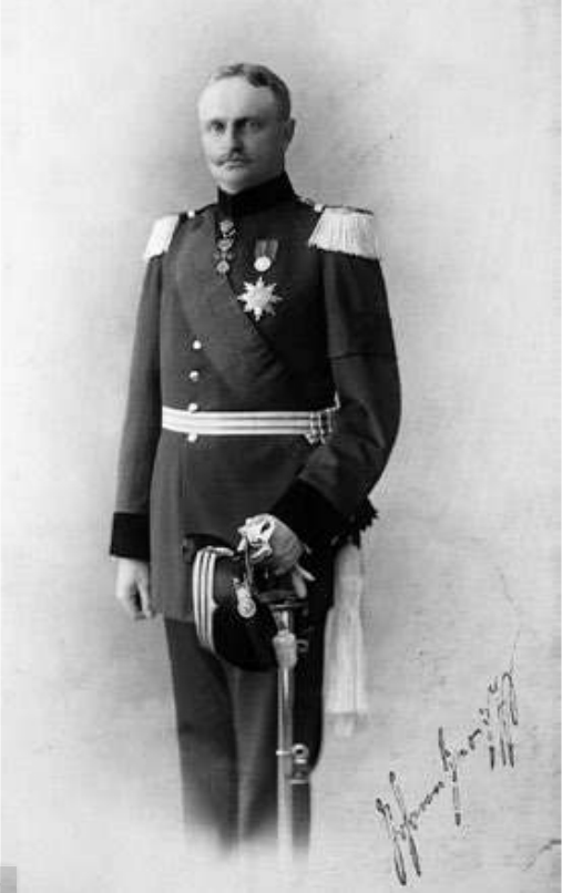 Prinz Johann Georg von Sachsen 1900